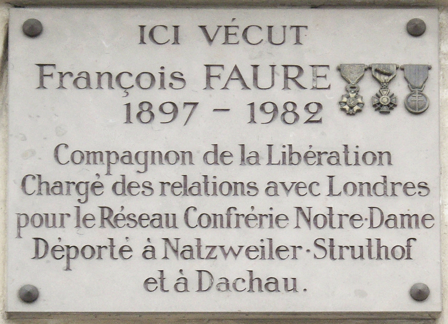 Plaque apposée au n° 167 du boulevard Saint-Germain, Paris 6e. « Ici vécut François Faure, 1897-1982, Compagnon de la Libération, chargé des relations avec Londres pour le réseau Confrérie Notre-Dame, déporté à Natzweiler-Struthof et à Dachau. »